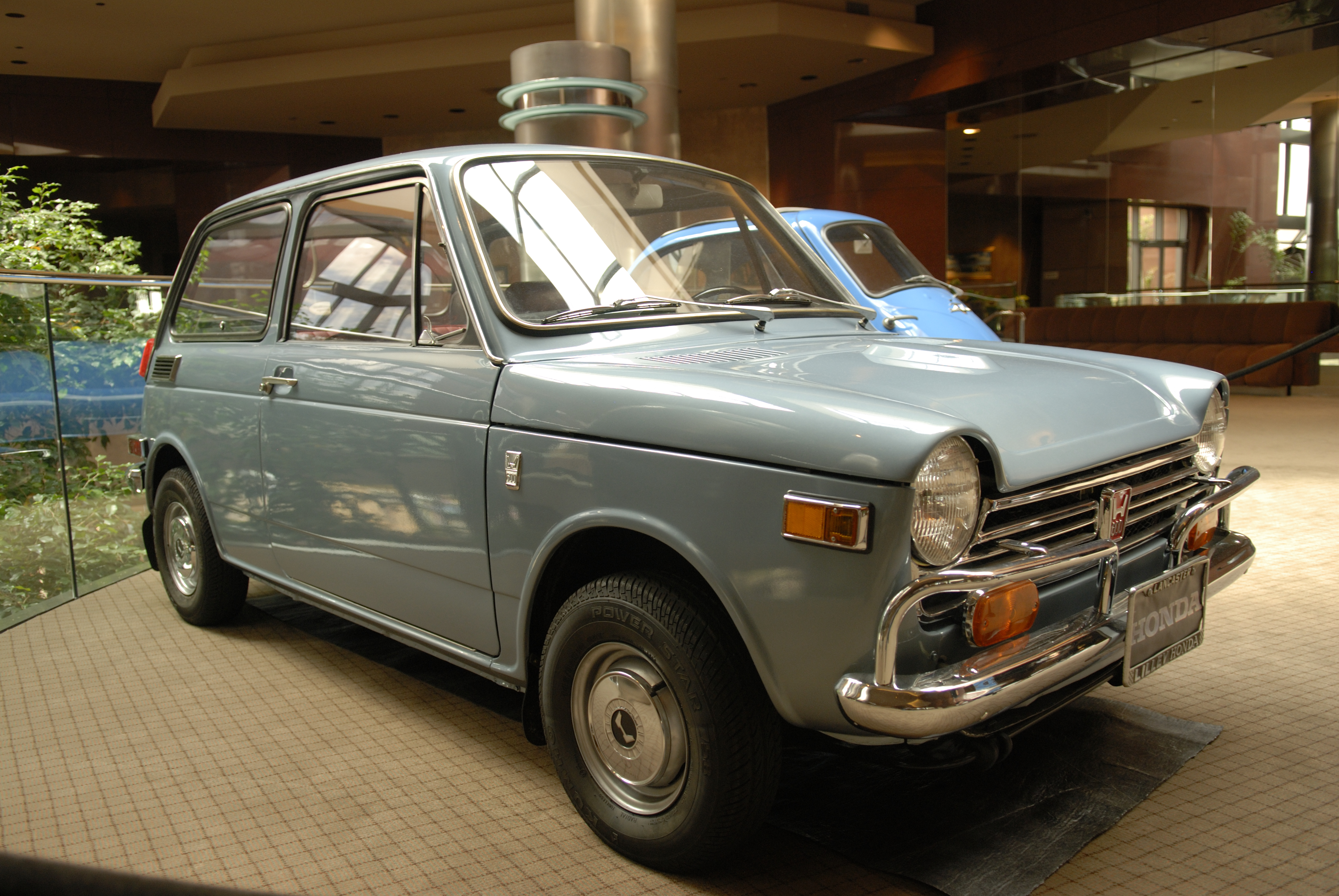 18Jul09_Minio_148.JPG